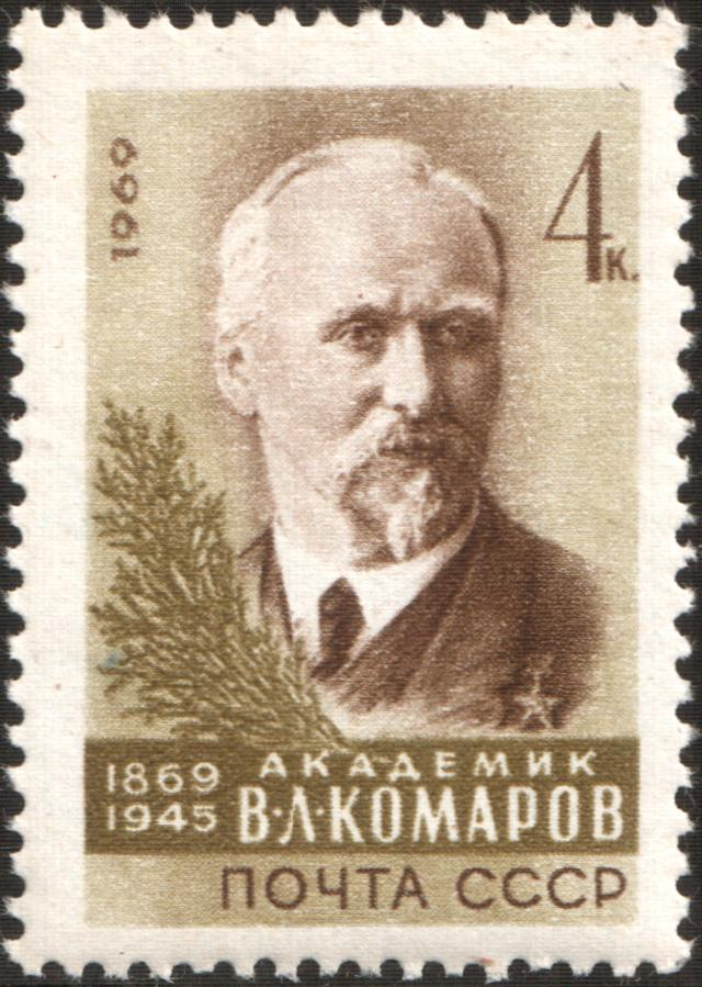 Почтовая марка СССР - Комаров Владимир Леонтьевич, Герой Социалистического Труда